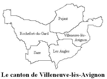 Le canton de Villeneuve-lès-Avignon Image personnelle